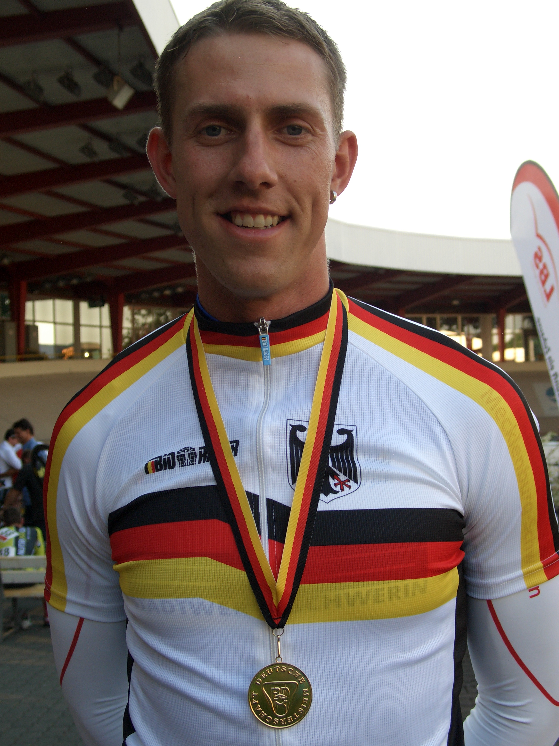 Stefan Nimke, Radsportler. Deutsche Bahnrad-Meisterschaften 2010 in Cottbus